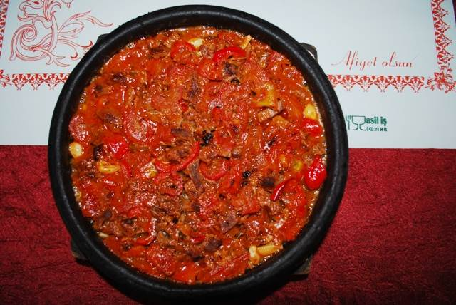 Belen Tava